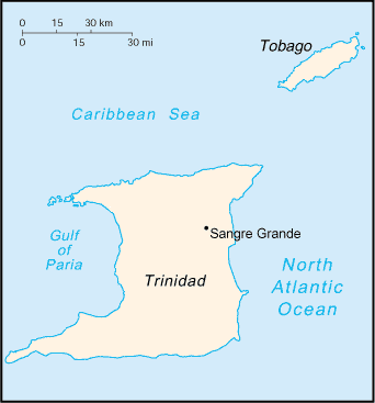 Sangre Grande